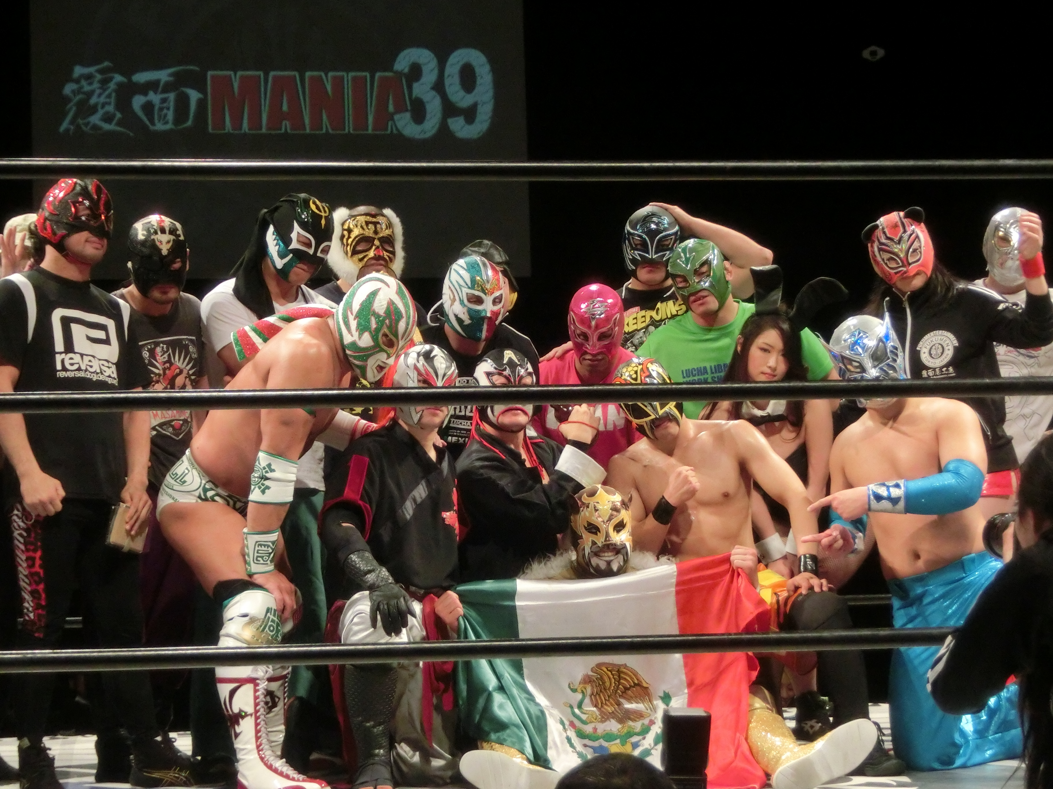 FUKUMEN-MANIA201802